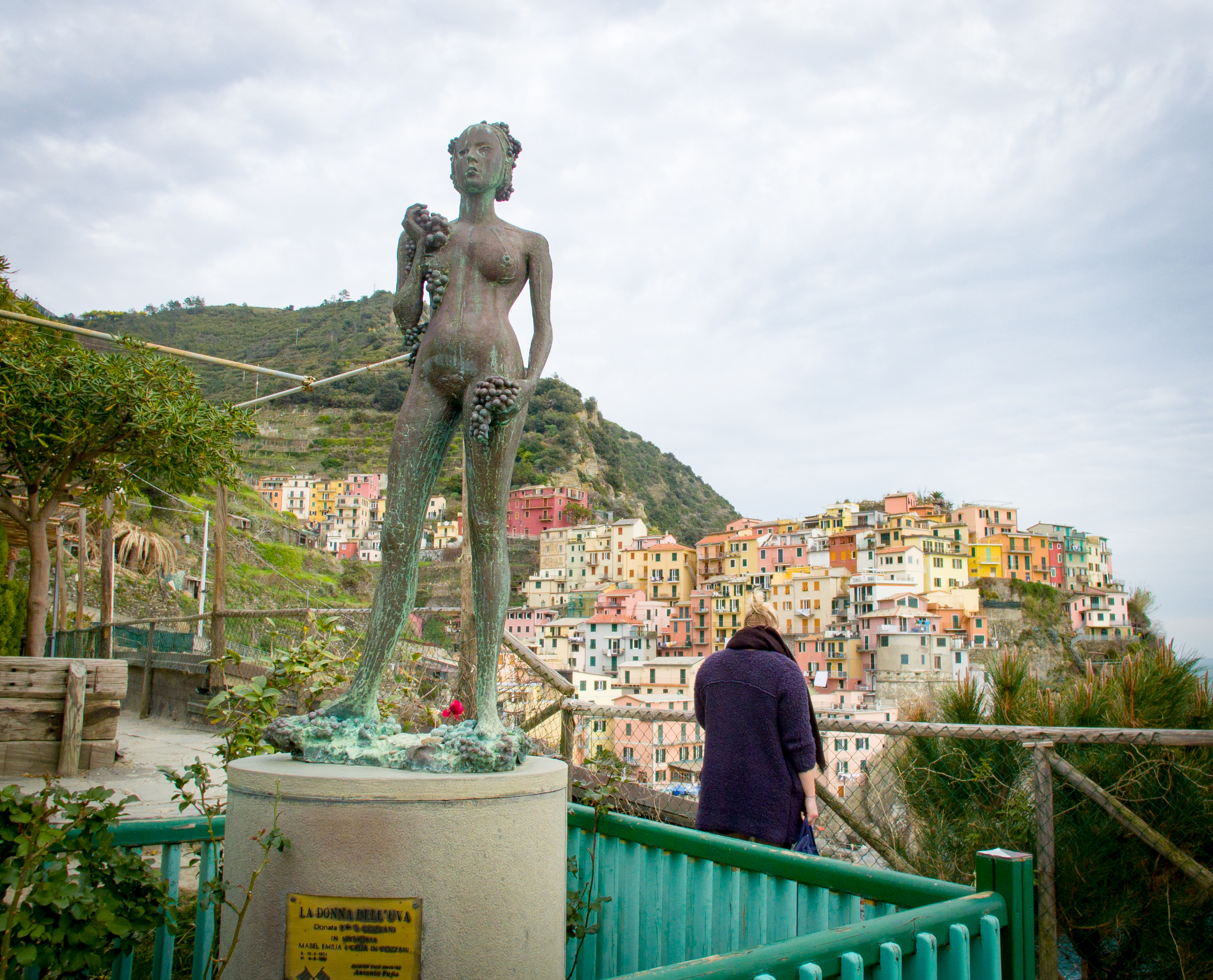 Escultura de bronce llamada La Donna Dell' Uva. Fue creada por Antonio Pujia en 1971. Mide 165 cm de alto x 70 cm de ancho. Se encuentra emplazada en la localidad italiana de Manarola, Punta Bonfiglio, La Spezia. Fue realizada en memoria de Renata S. Cozzani.